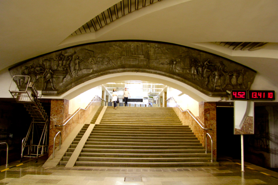 Yekaterinburg Metro (Екатеринбургский метрополитен)